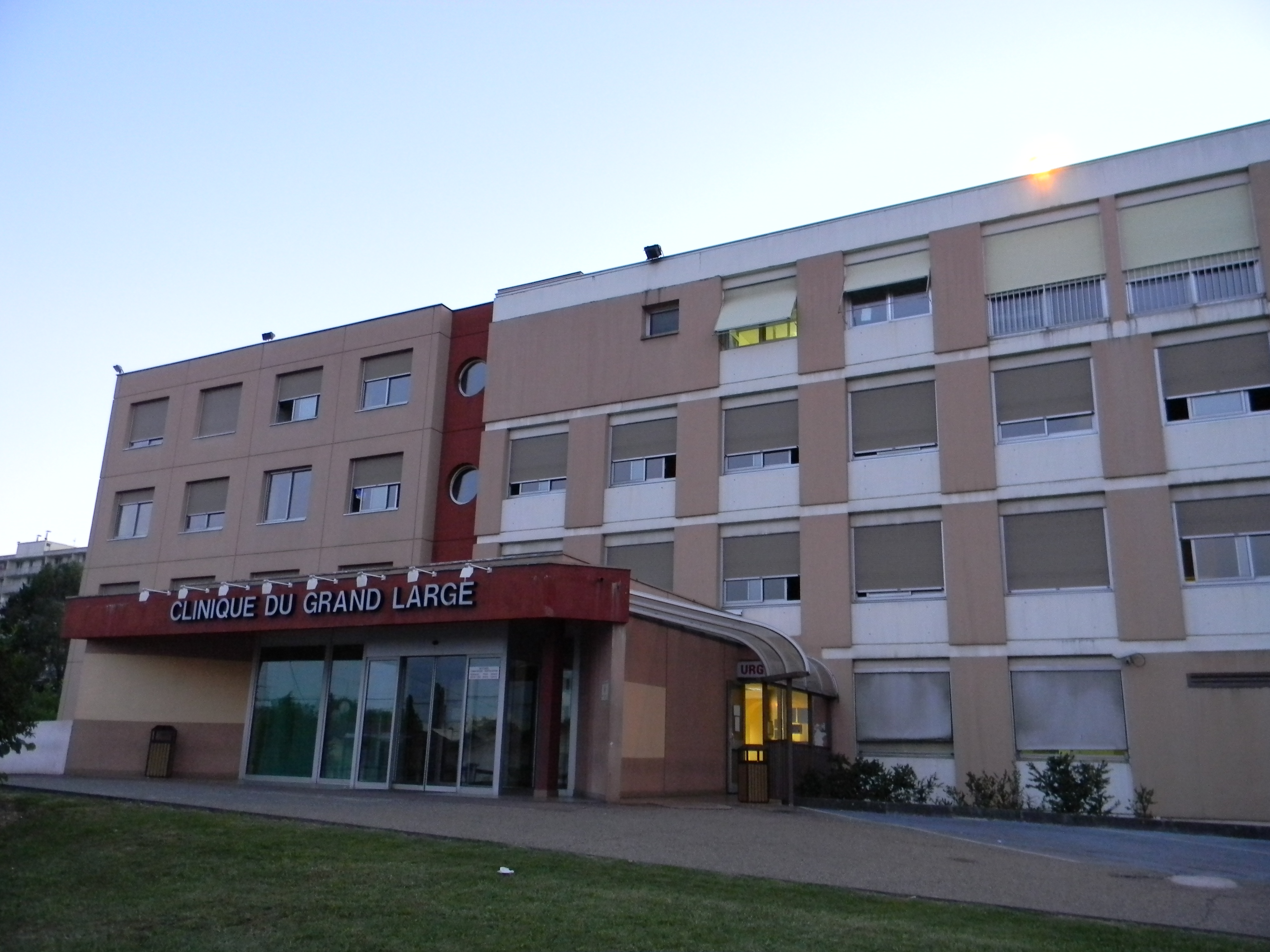 La clinique du Grand-Large à Décines.